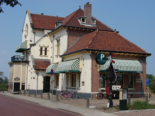 Nedersaksies: Uuthoorn et olde station